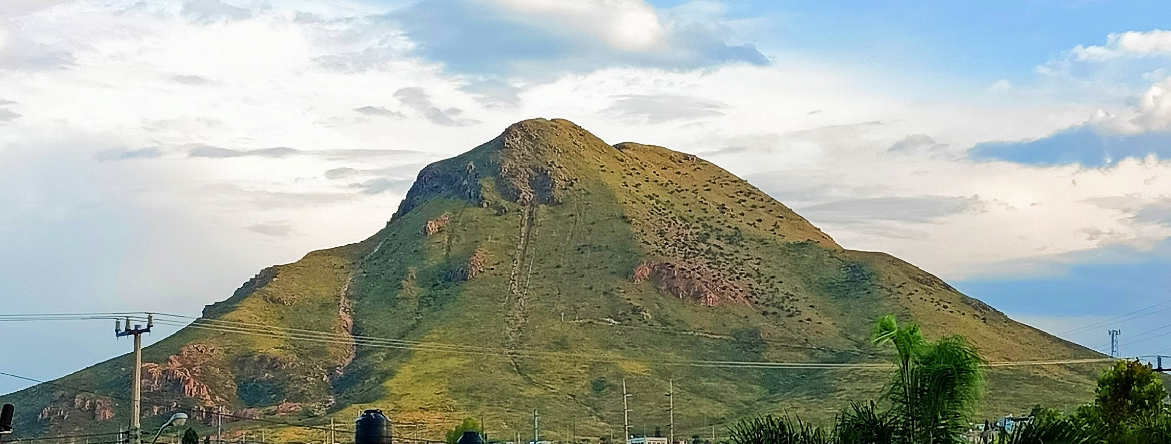 Cerro grande en Diciembre del 2014